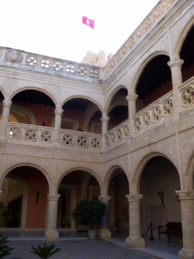 Patio del castillo de Luna, en Rota-Cadiz-Andalucía-España